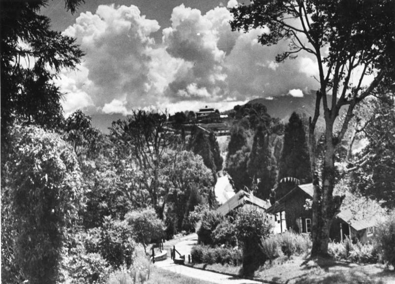 Tibetexpedition, Blick auf den Palast des Maharaja Gangtok, Blick von Dilkuscha auf den Palast des Maharadscha [Maharaja] von Sikkim [Blick vom Gästehaus; Maharaja, Chogyal]